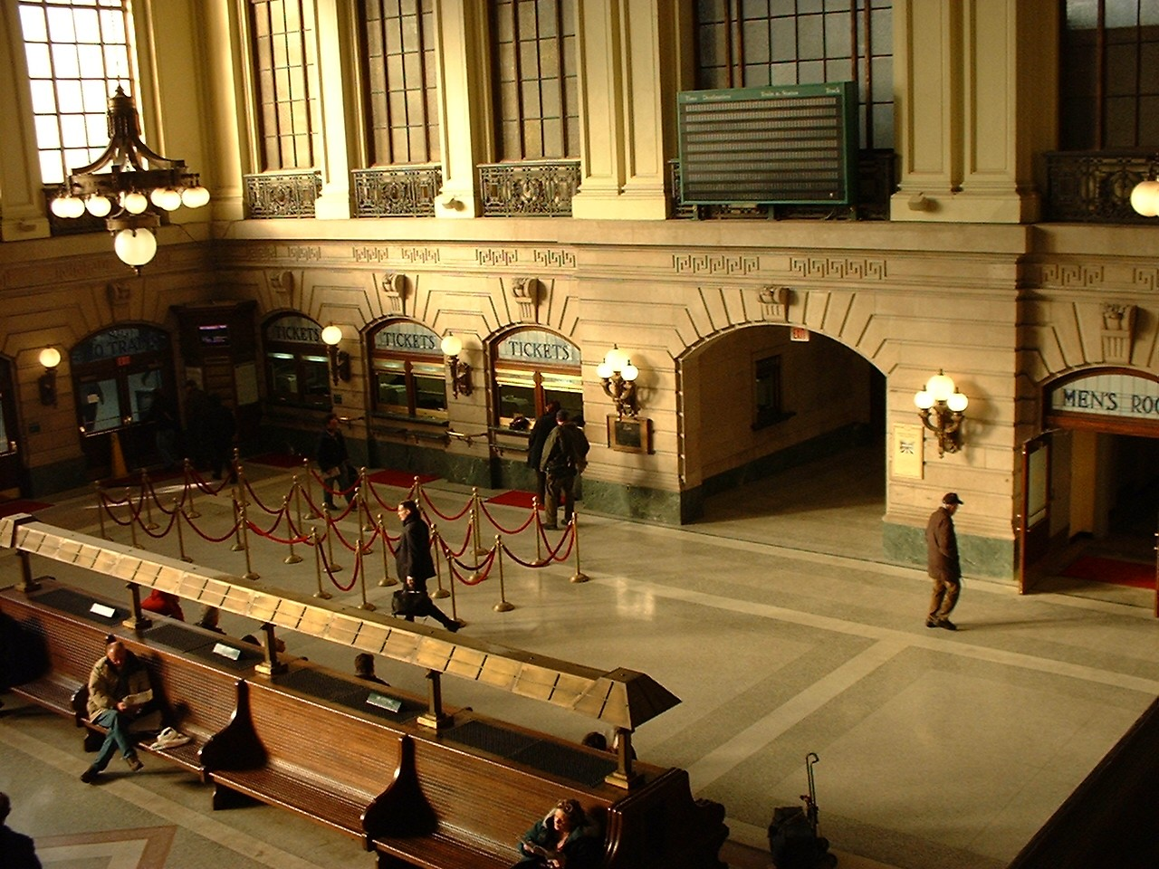 Estación Terminal Hoboken en Nueva Jersey